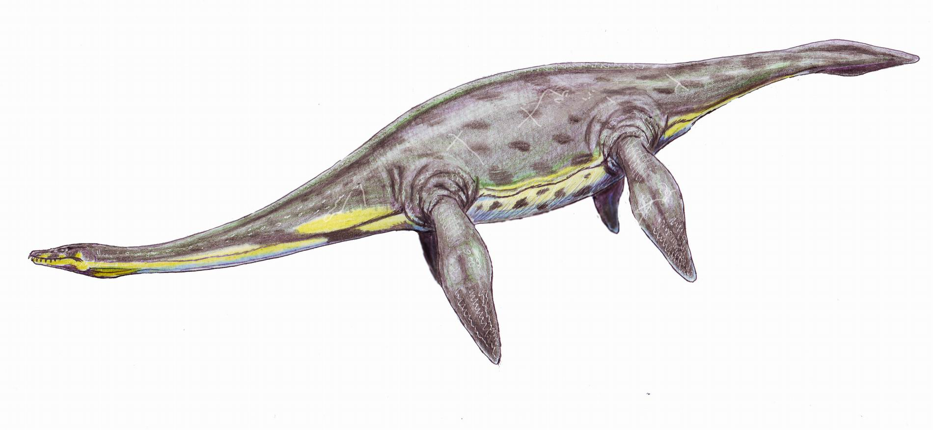 Microcleidus